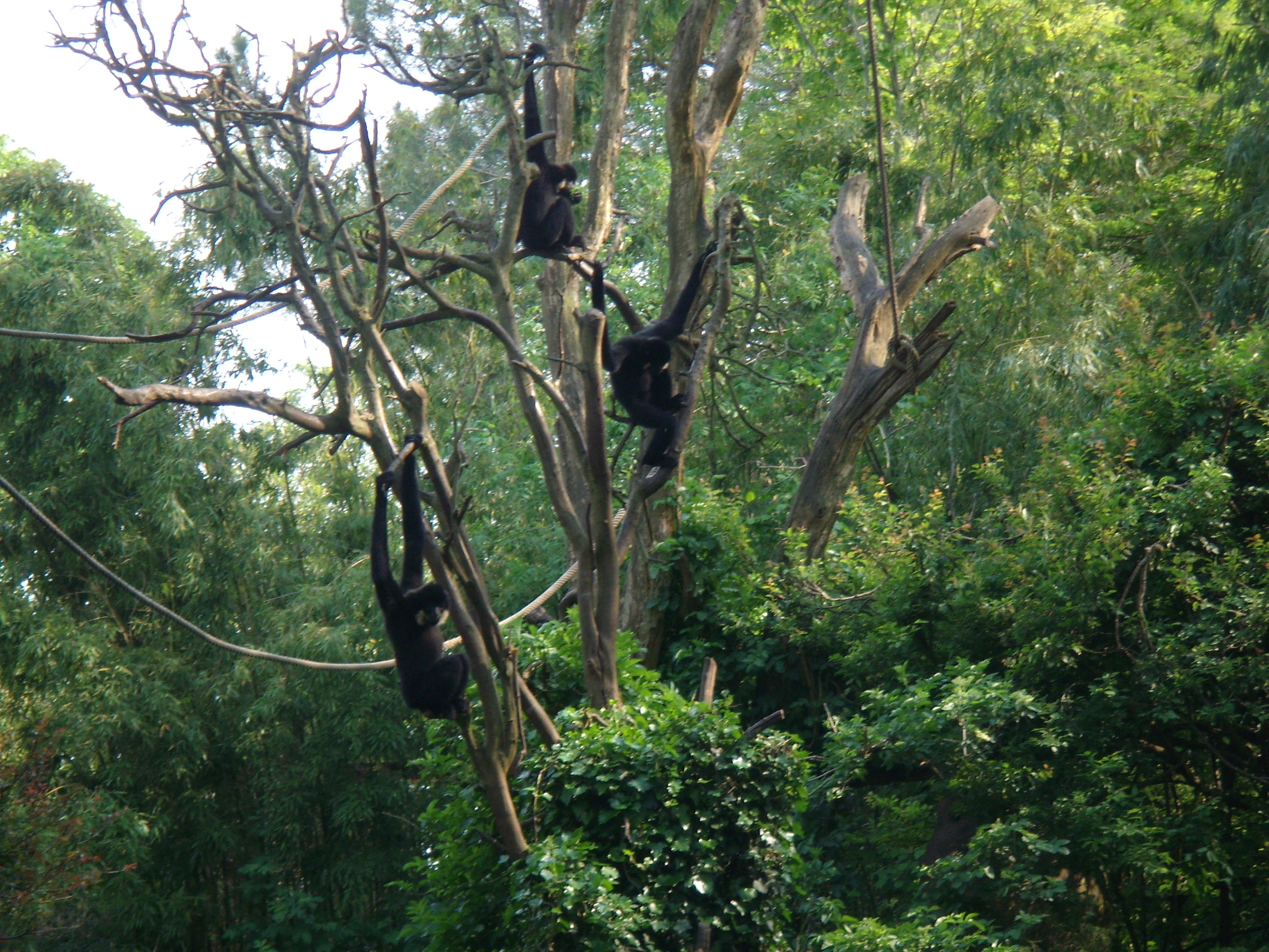 Gibbons à joues jaunes (Nomascus gabriellae) au Bioparc Zoo de Doué-la-Fontaine, Pays de la Loire, France.